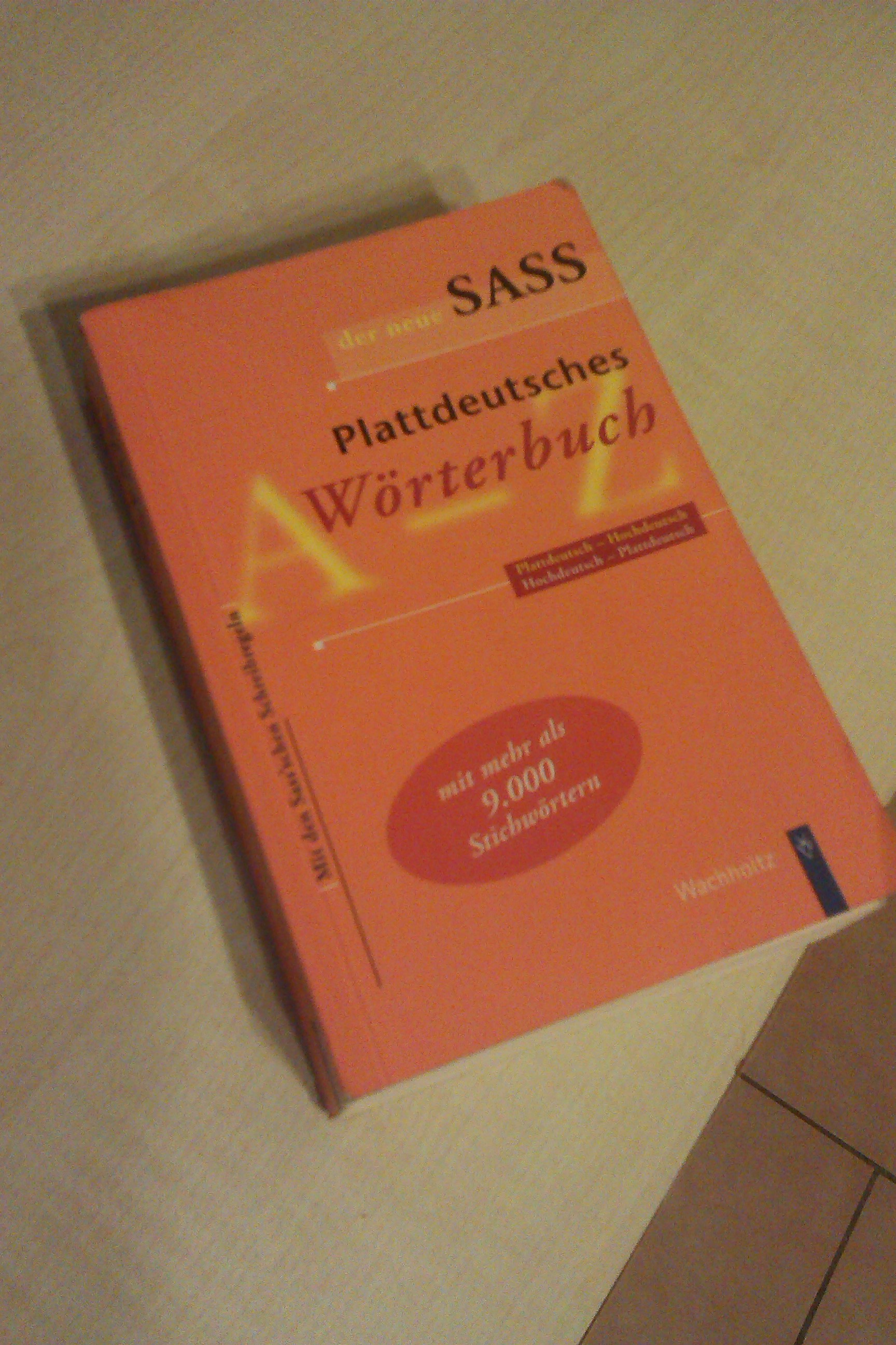 Sass Wöörbook vun de Plattdüütsche Spraak.